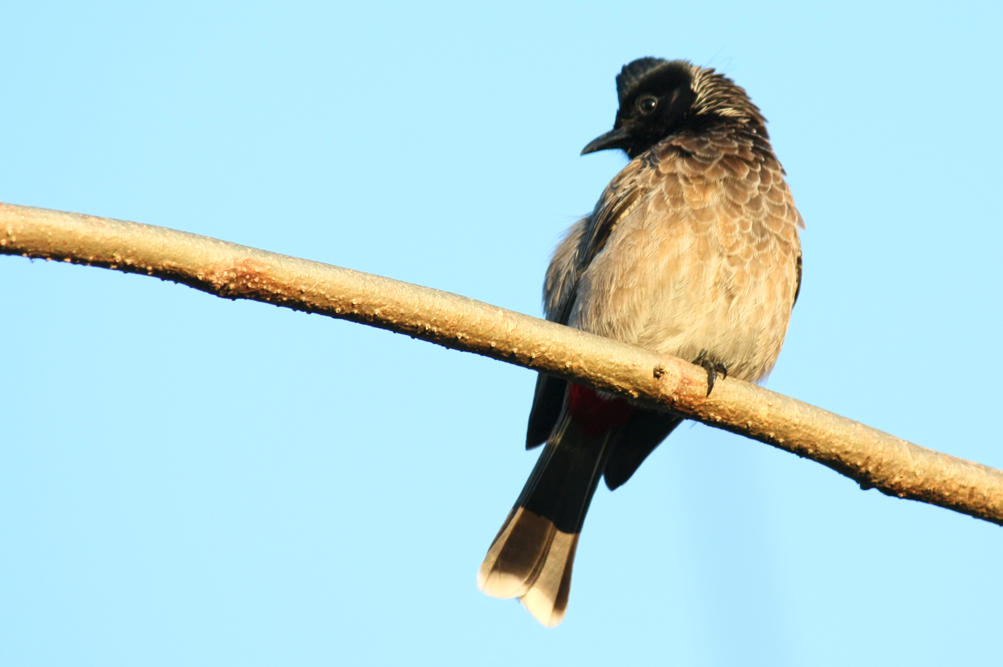 கொண்டைக்குருவி - தமிழ்நாட்டில்/ இலங்கையில் காணப்படும் பறவைகள்